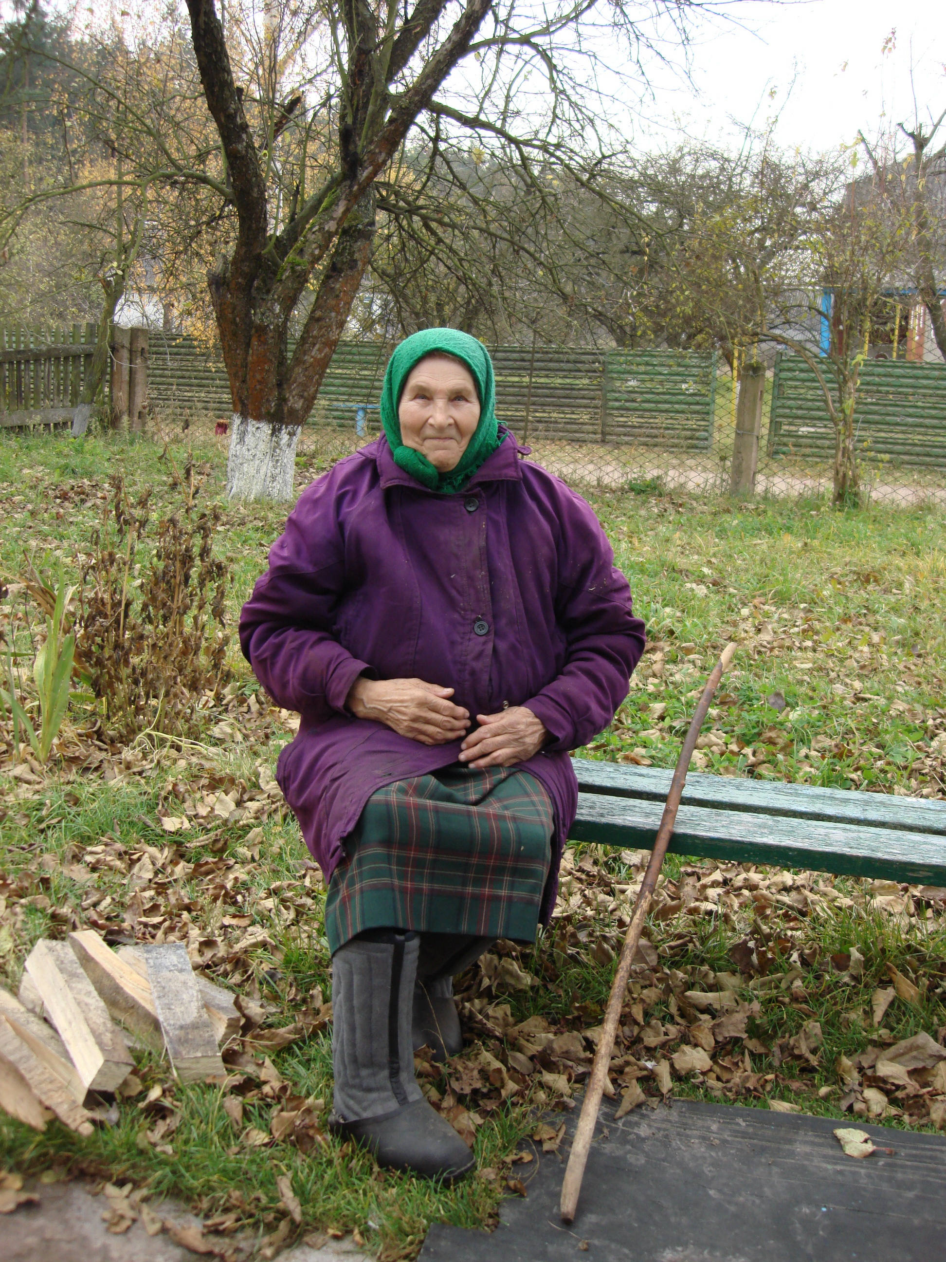 Гастарбайтер с.Сингаї Коростенського району Камінська Вера (Волохович Віра Дмитрівна?)